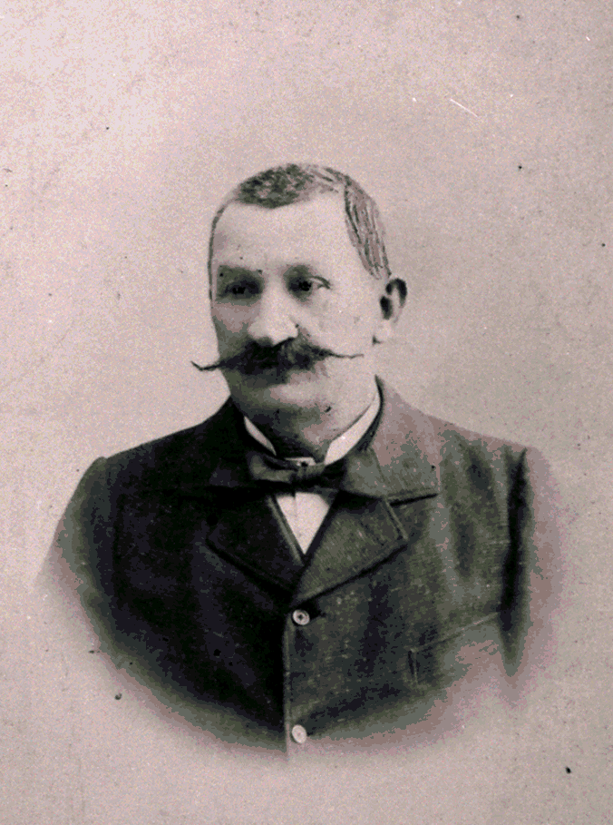 Boldogfai Farkas Ferenc (1838–1908) Zala vármegye alszámvevője, Zalaegerszeg